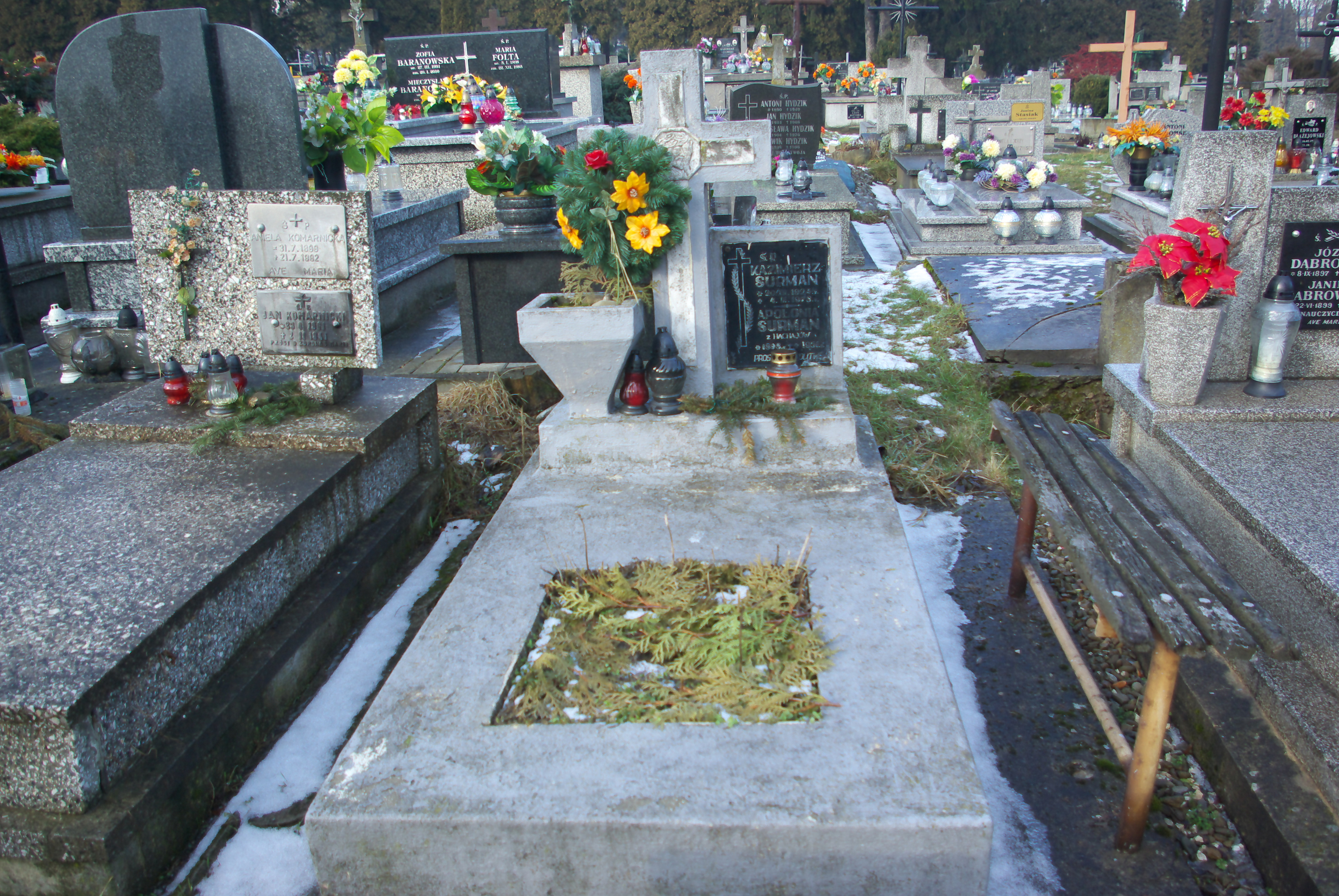 Nagrobek Apolonii i Kazimierza Surman w części „Matejki Stary” Cmentarza Centralnego w Sanoku.